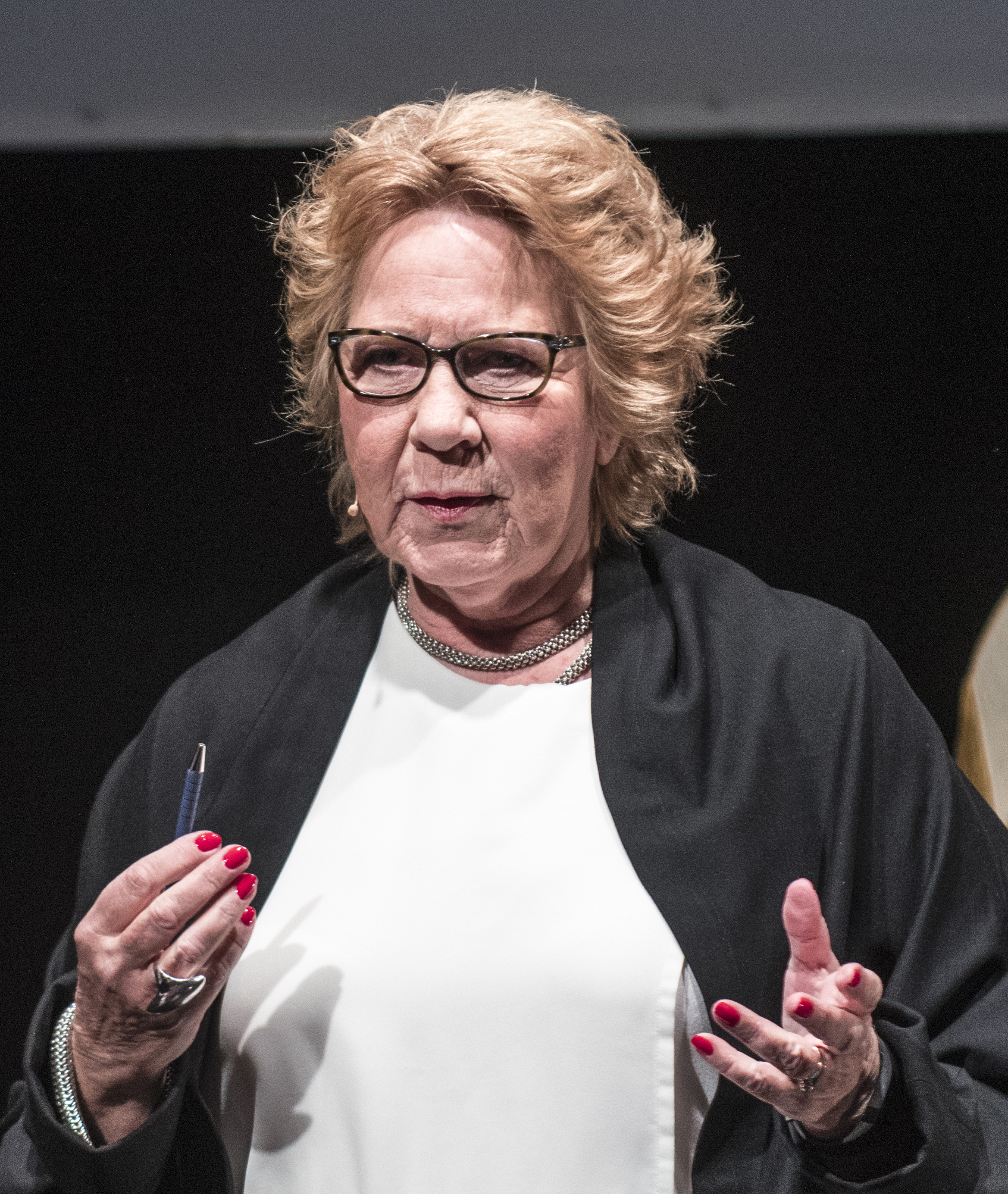 Olje- og energiminister Tord Lien (Frp) sammen med programleder Anne Grosvold under historisk seminar 3. november 2016 i Ballroom i Oslo. Foto: Olav Standal Tange, Norsk olje og gass